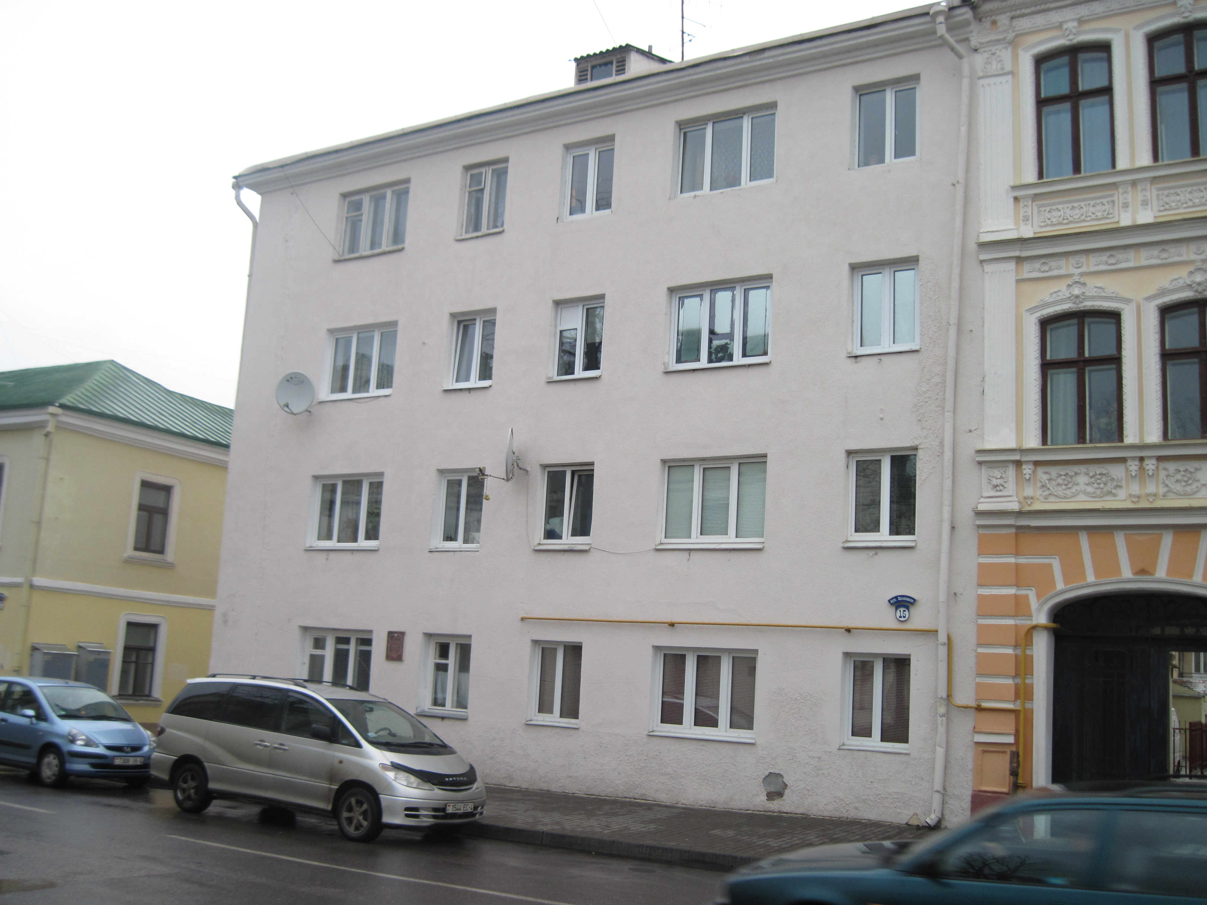 Беларуская (тарашкевіца): Будынак па вуліцы Замкавая,15 у Гродна